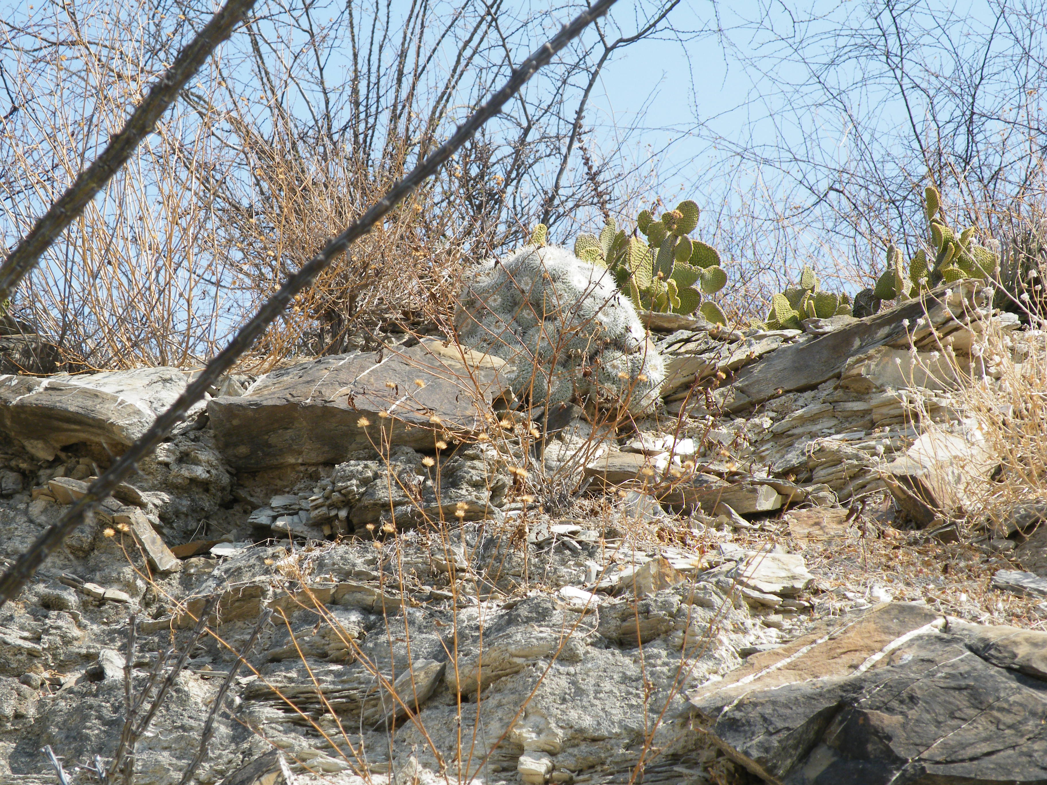 Pena Blanca, Queretaro